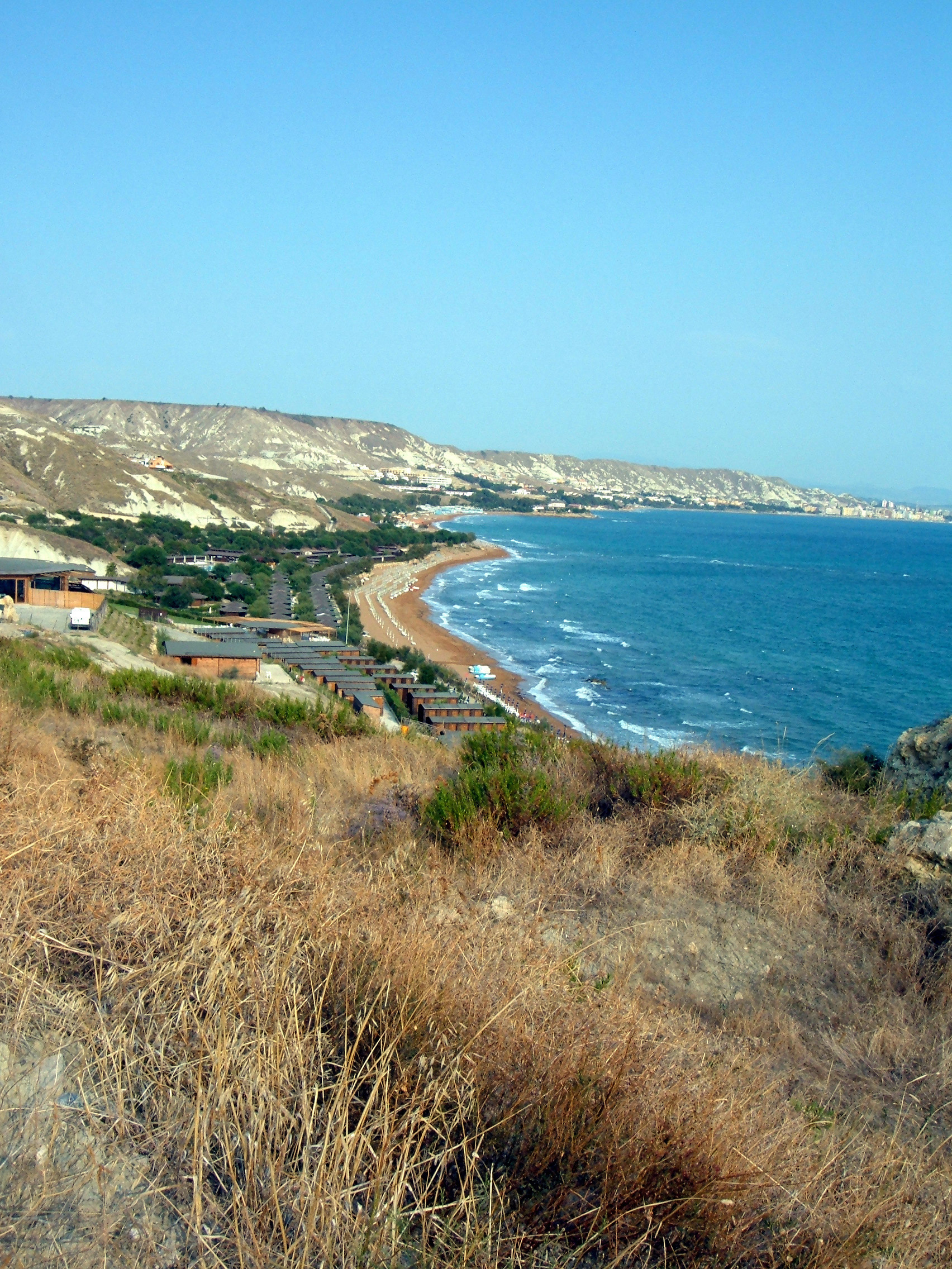 Crotone, KR, Calabria, Italy